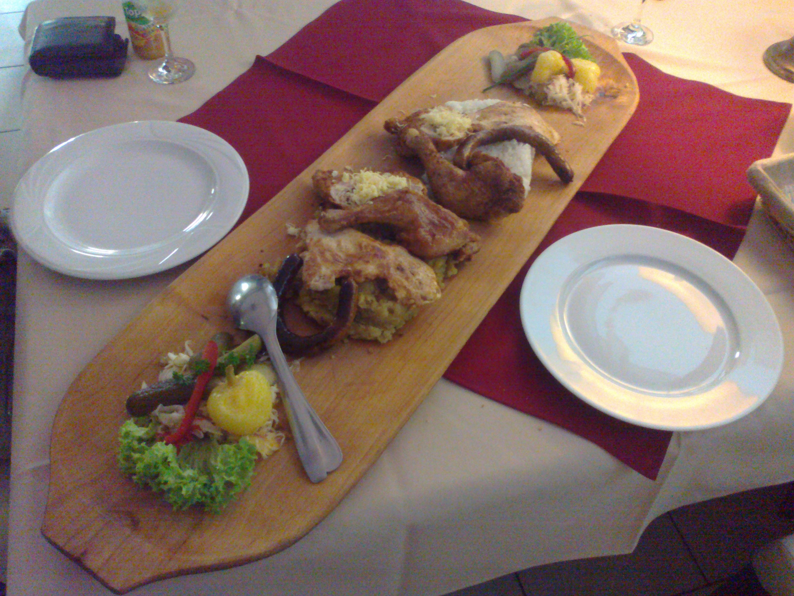 fatányéros, Kismaros, Öreg Morgó étterem